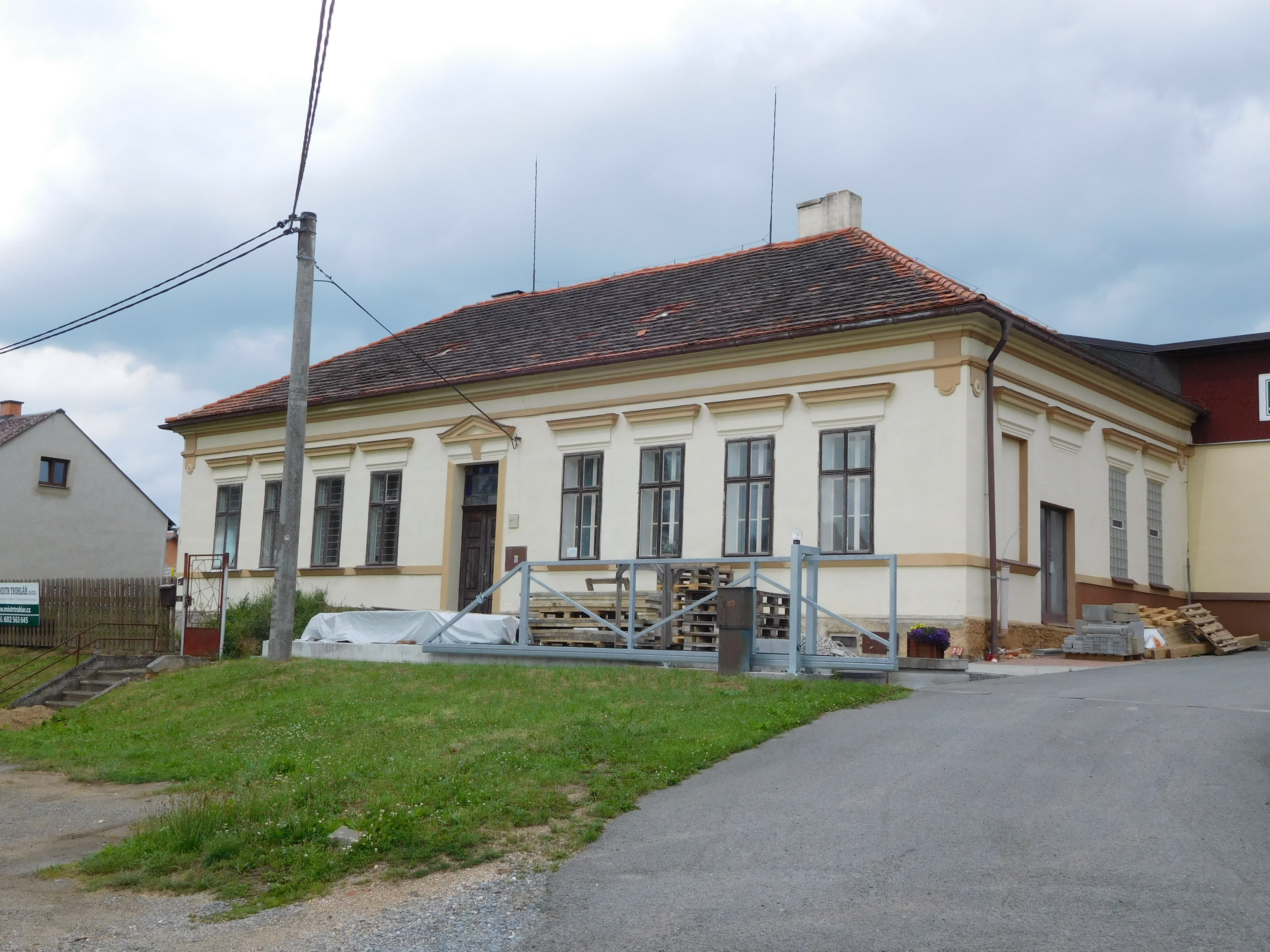 Myslinka - dům č.p. 30 (bývalá škola?)